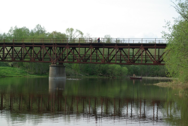 Anykščių geležinkelio tiltas